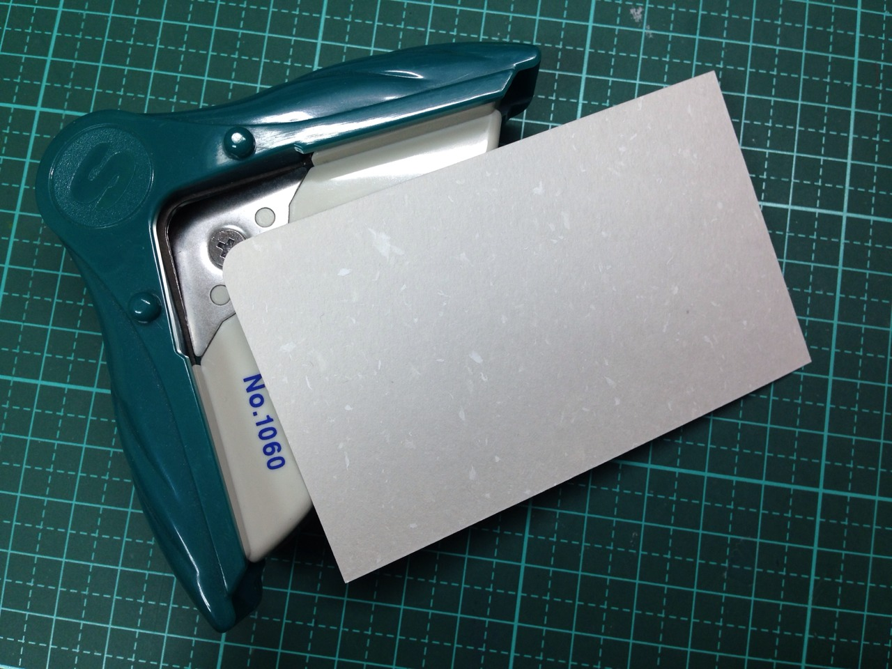 中文（台灣）: 圓角器及其成品